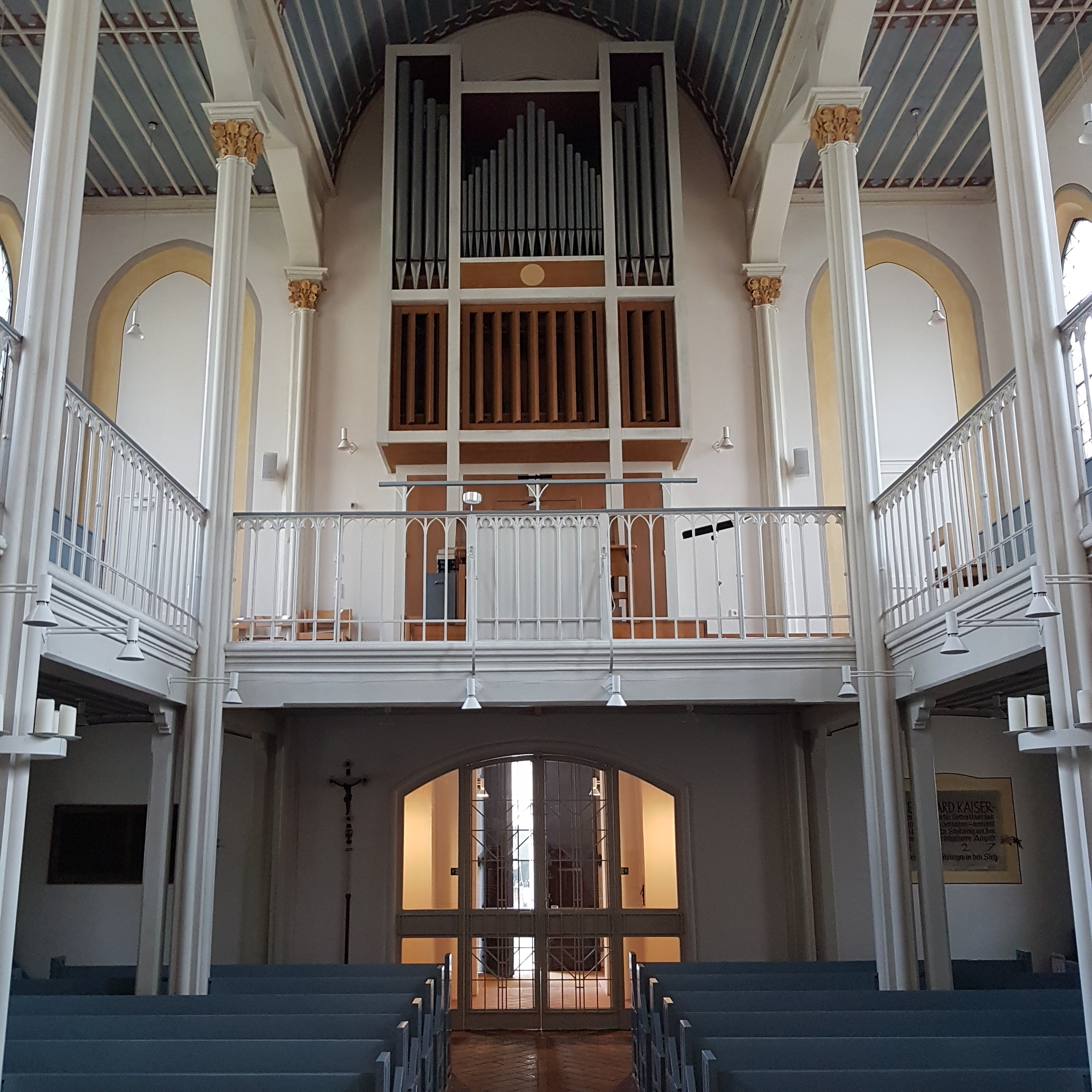 Passau, evang Matthäuskirche, Innenraum mit Blick zur Empore